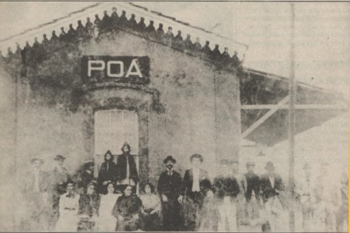 Estação Poá do século XIX